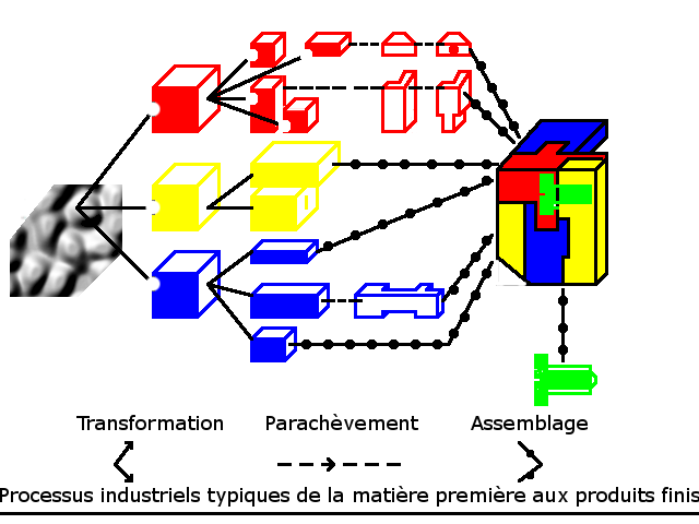 Les processus industriels typiques des matières premières au produits finis. Transformation, parachèvement, assemblage Barbetorte, 1 juin 2006